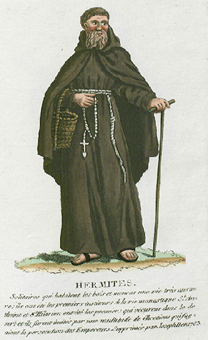 Collection de costumes de tous les ordres monastiques, supprimés à differentes époques, dans la ci-devant Belgique, Bruxelles, Philippe Joseph Maillart et sœur, 1811